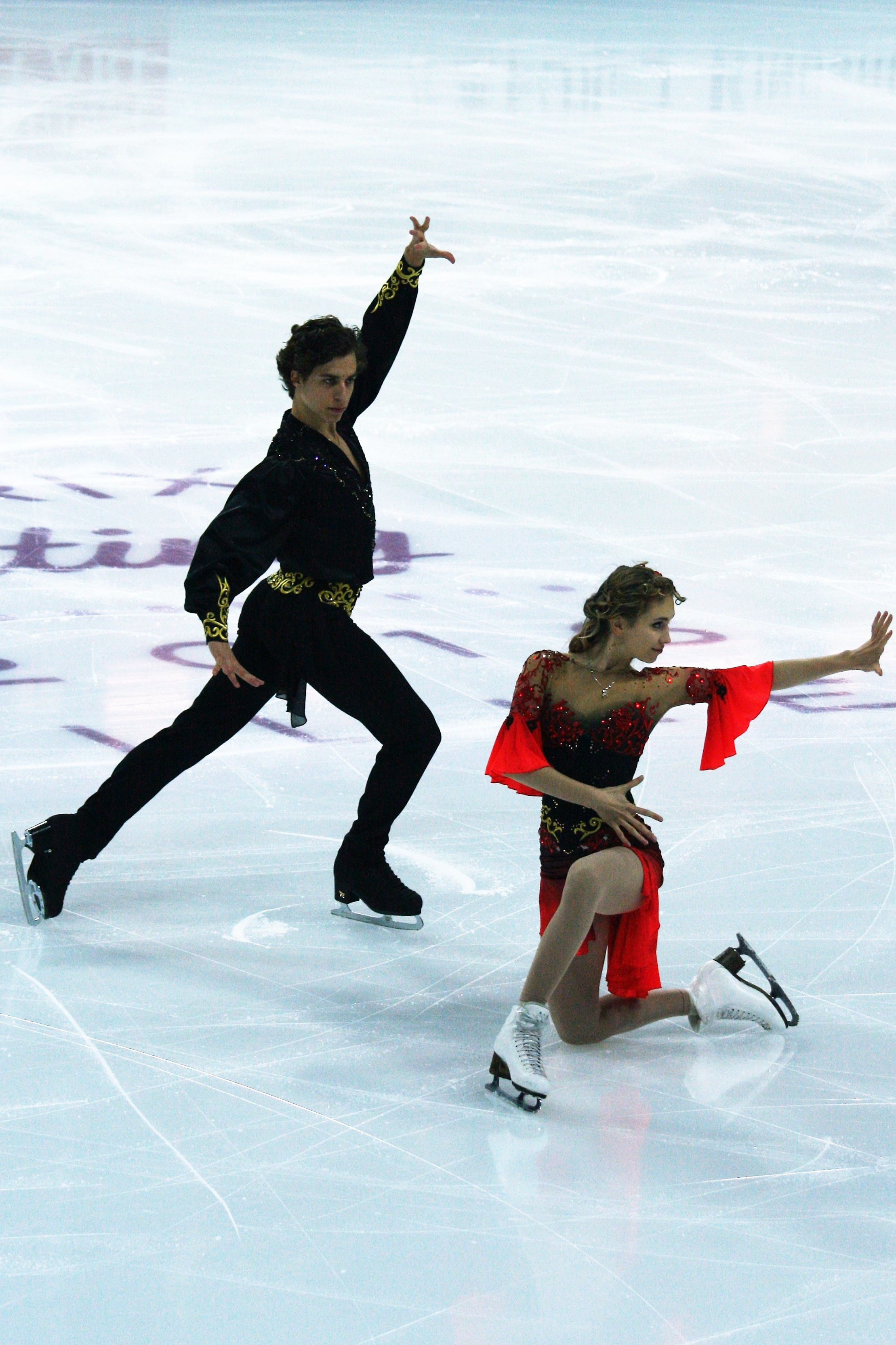 Анжелика Абашкина / Луи Торон (Франция) на финале Гран-при по фигурному катанию среди юниоров 2016-2017